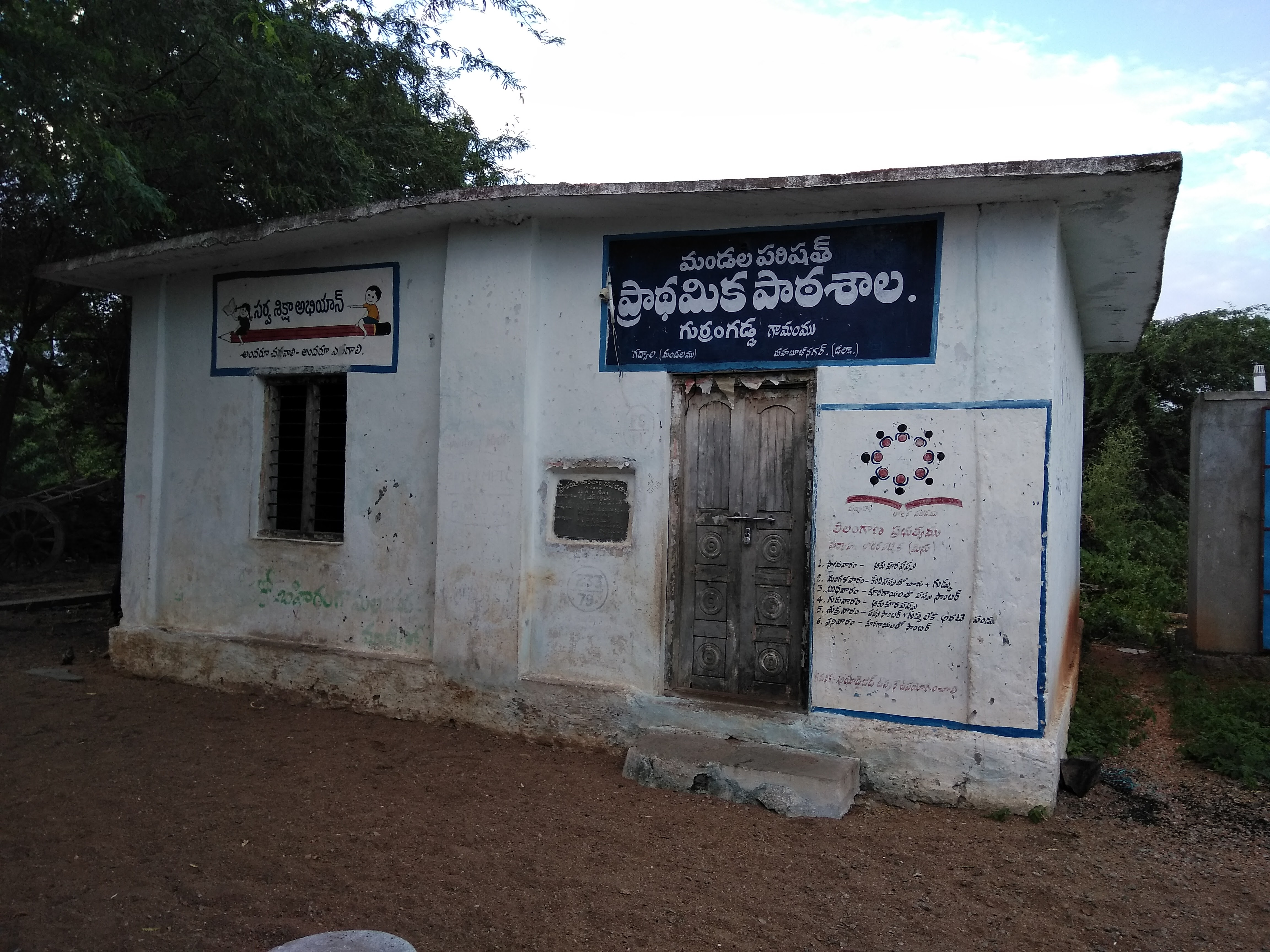 గుర్రంగడ్డ ప్రాథమిక పాఠశాల